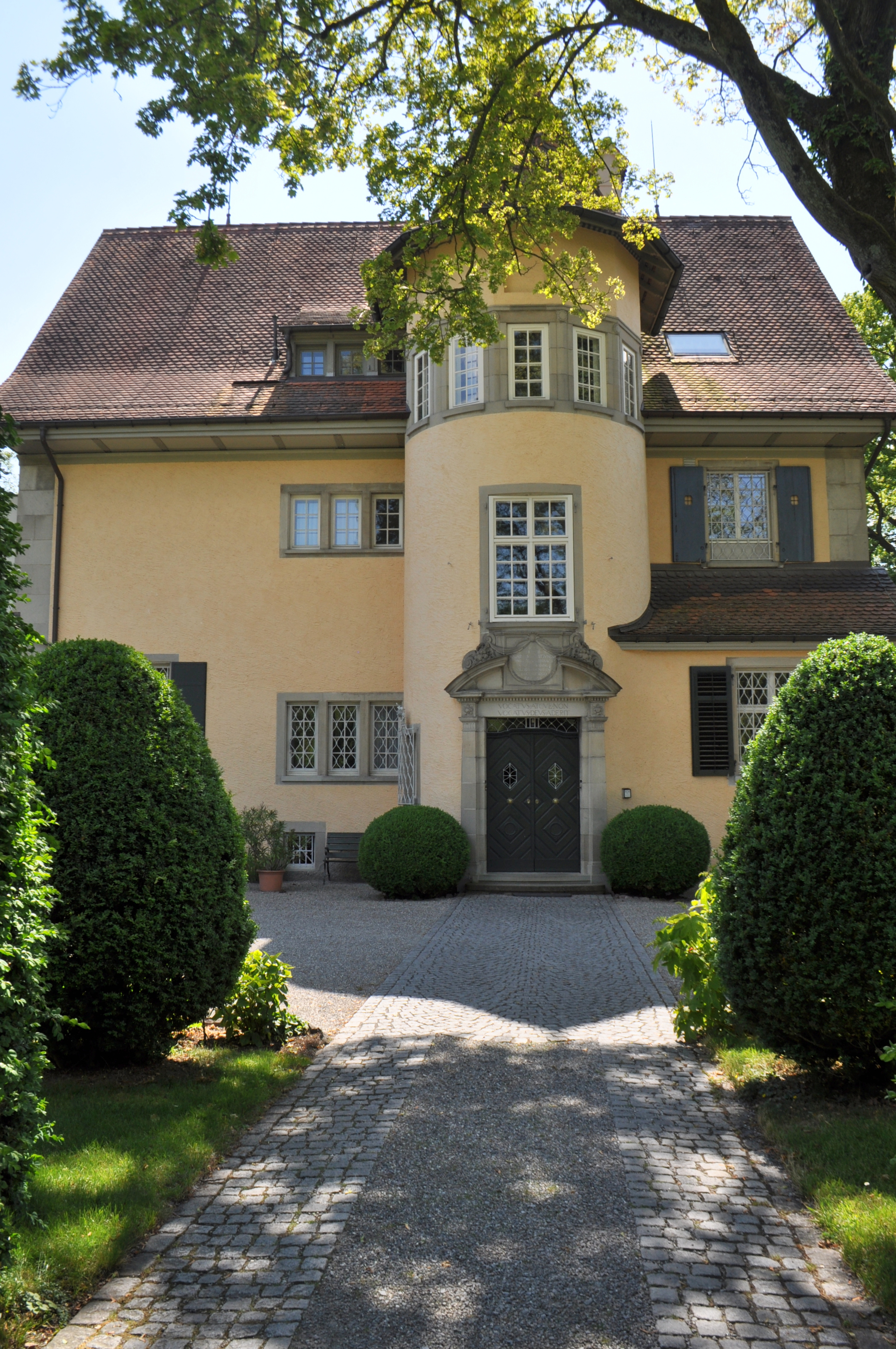 Wohnhaus von Carl Gustav Jung in Küsnacht, Seestrasse 228